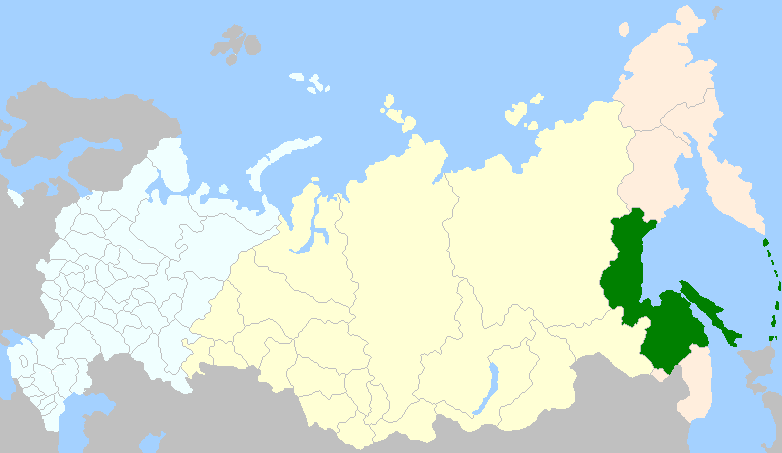 régions administratives occupées en 2008 par les Nivxes